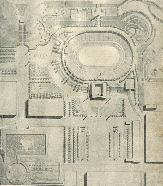 Стадион им. Касиора арх. М. Гречина и др.